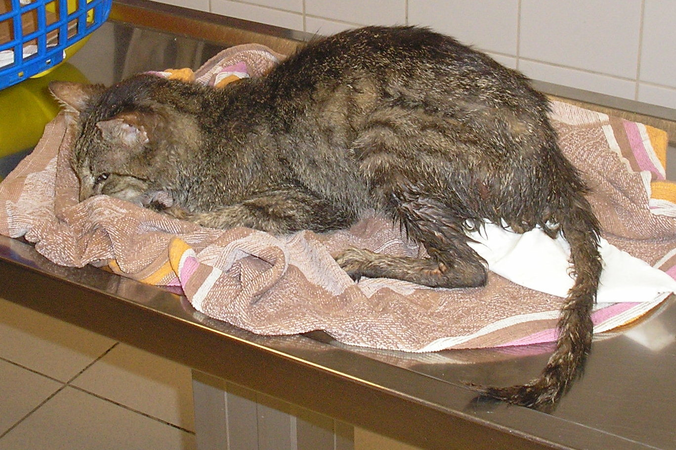 Panleukopéniás (macskaparvos) macska